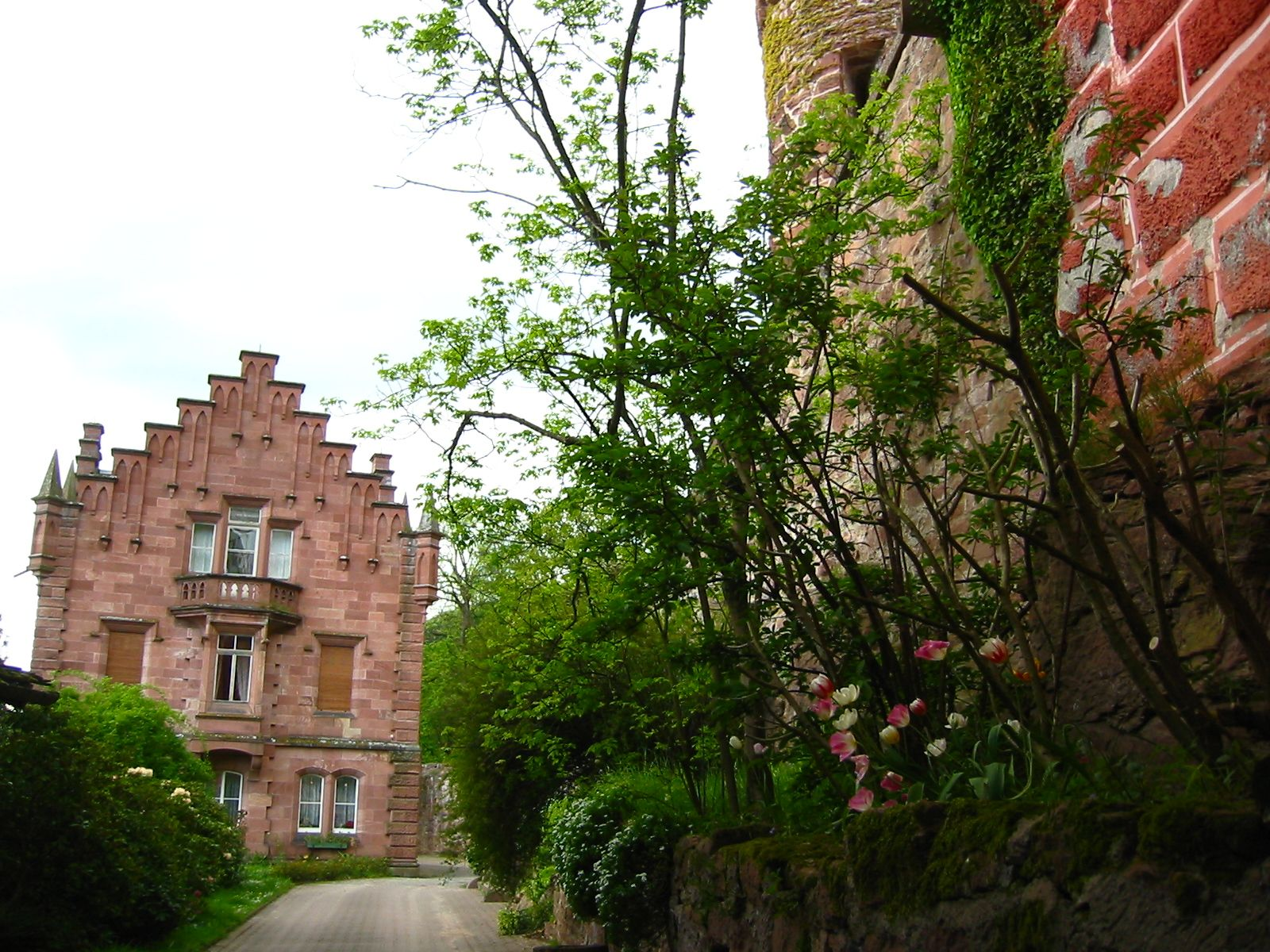 Zwingenberg